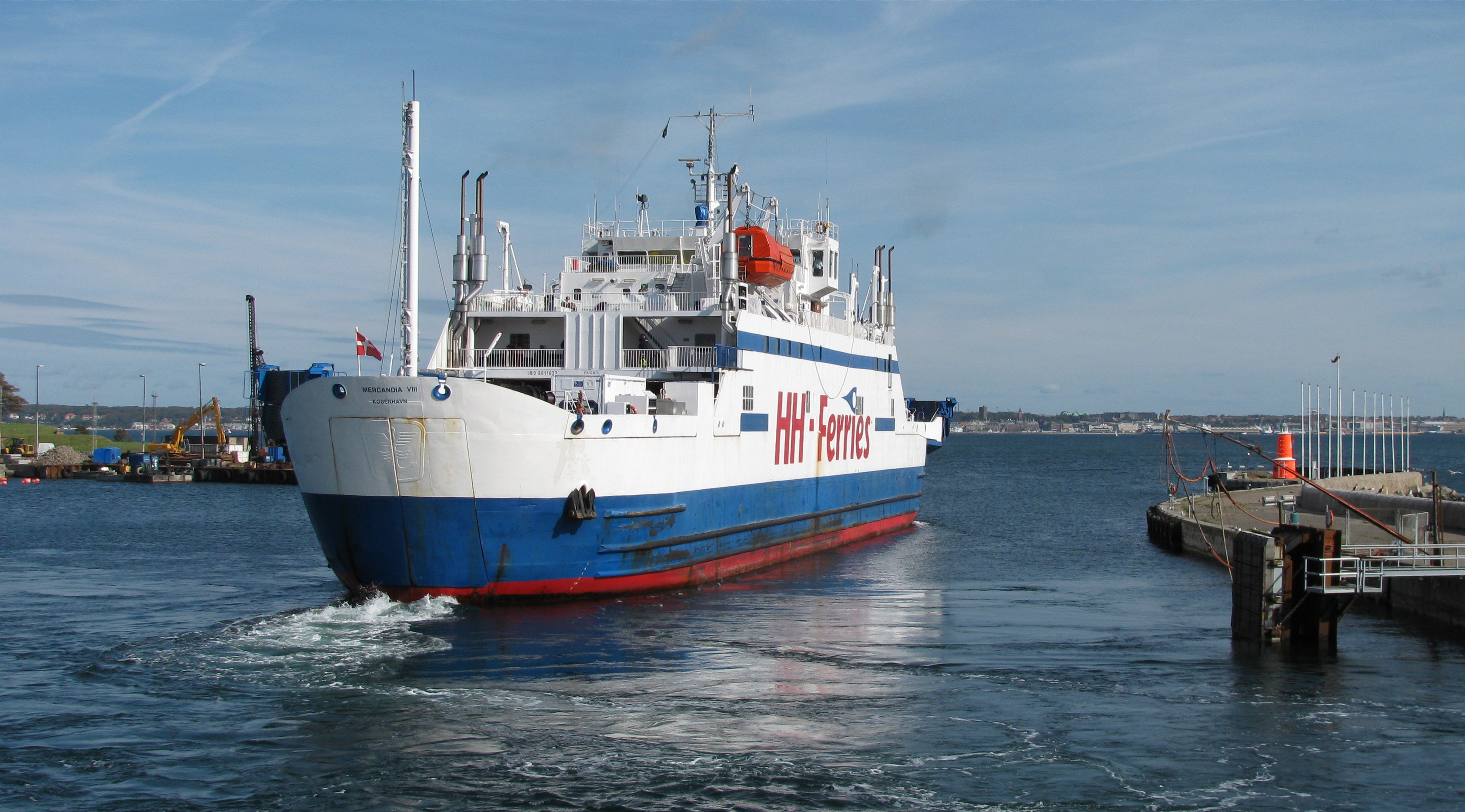 HH-Ferries ferry in Helsingør